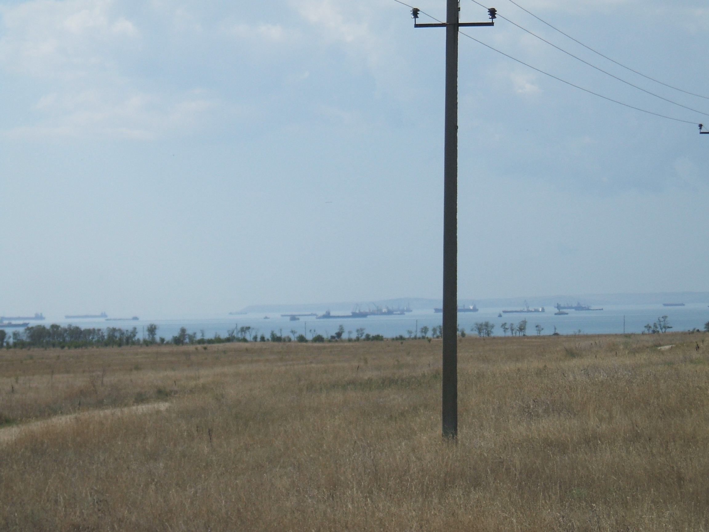 Выход в Чёрное море из Керченского пролива